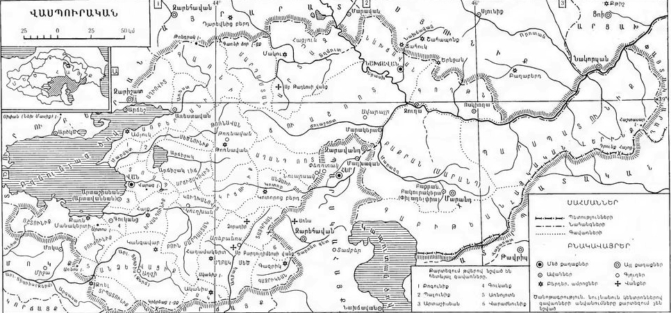 Վասպուրական